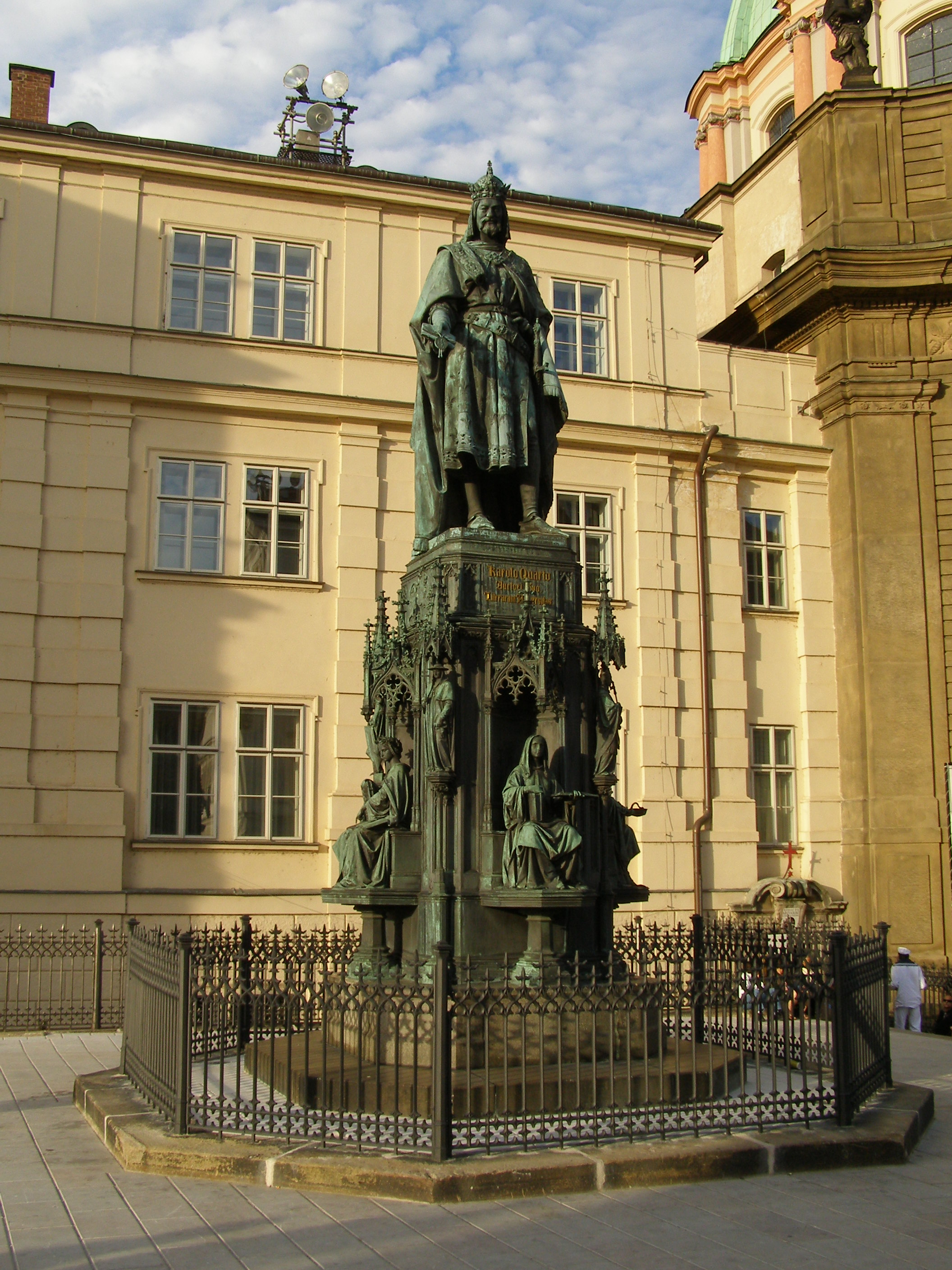 Pomník Karla IV. (Staré Město), Praha 1, Křižovnické nám., Staré Město